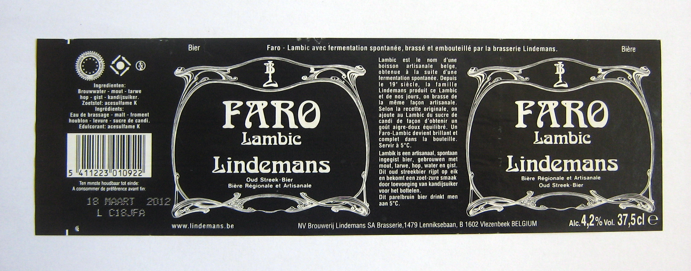 Etykieta piwa Faro typu Lambic z browaru Lindemans